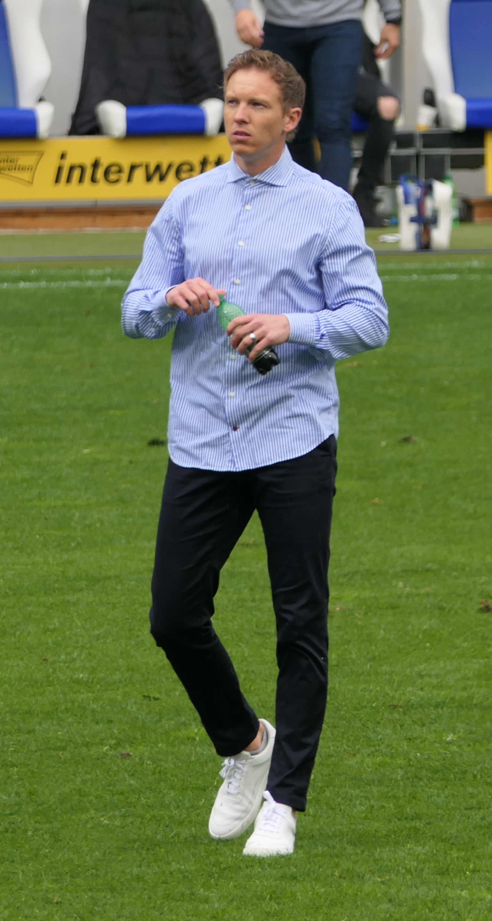 Der Fussballtrainer Julian Nagelsmann im Dienste der TSG 1899 Hoffenheim beim Heimspiel gegen den SV Werder Bremen am 11.05.2019.